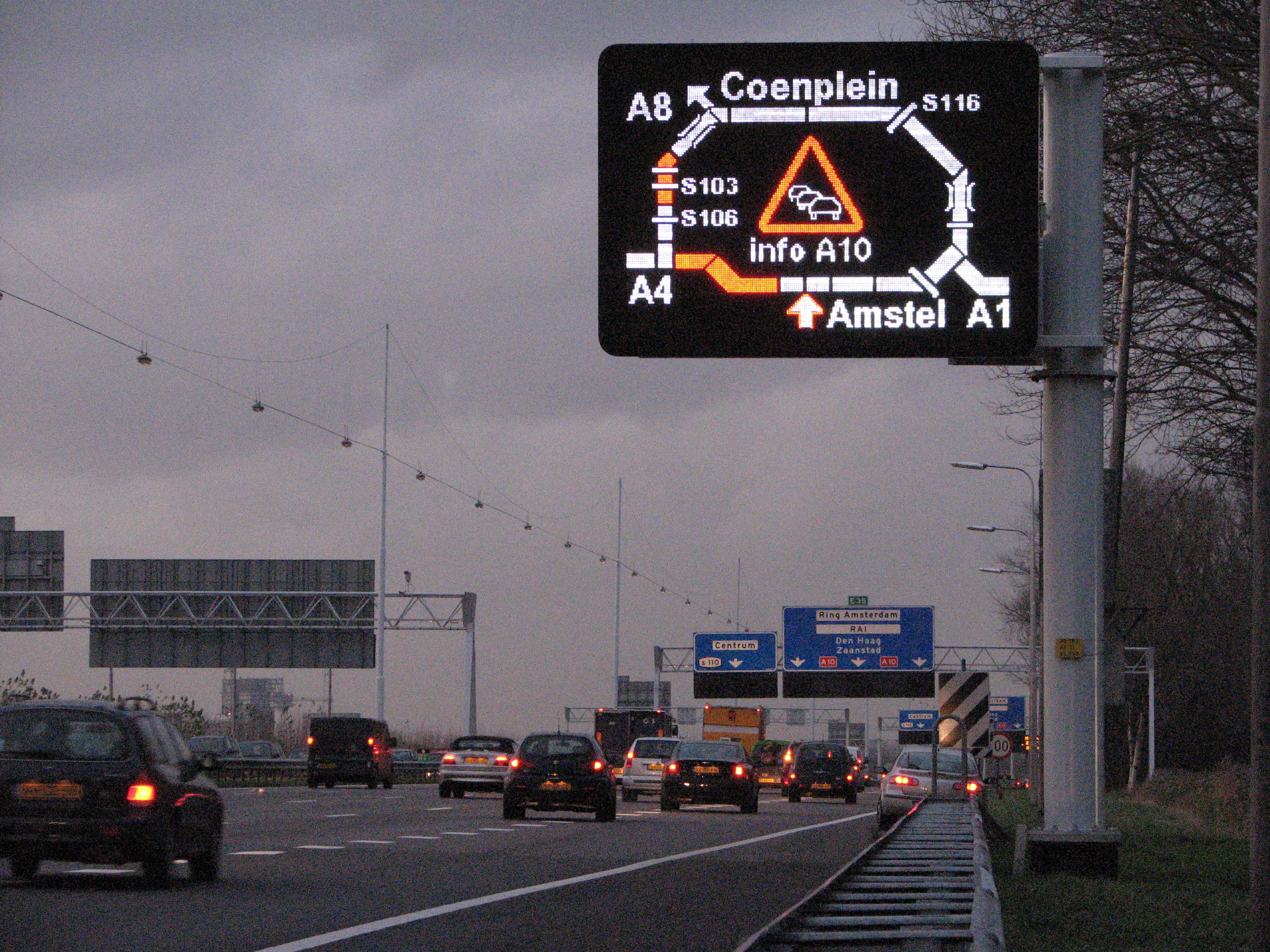 eigen foto